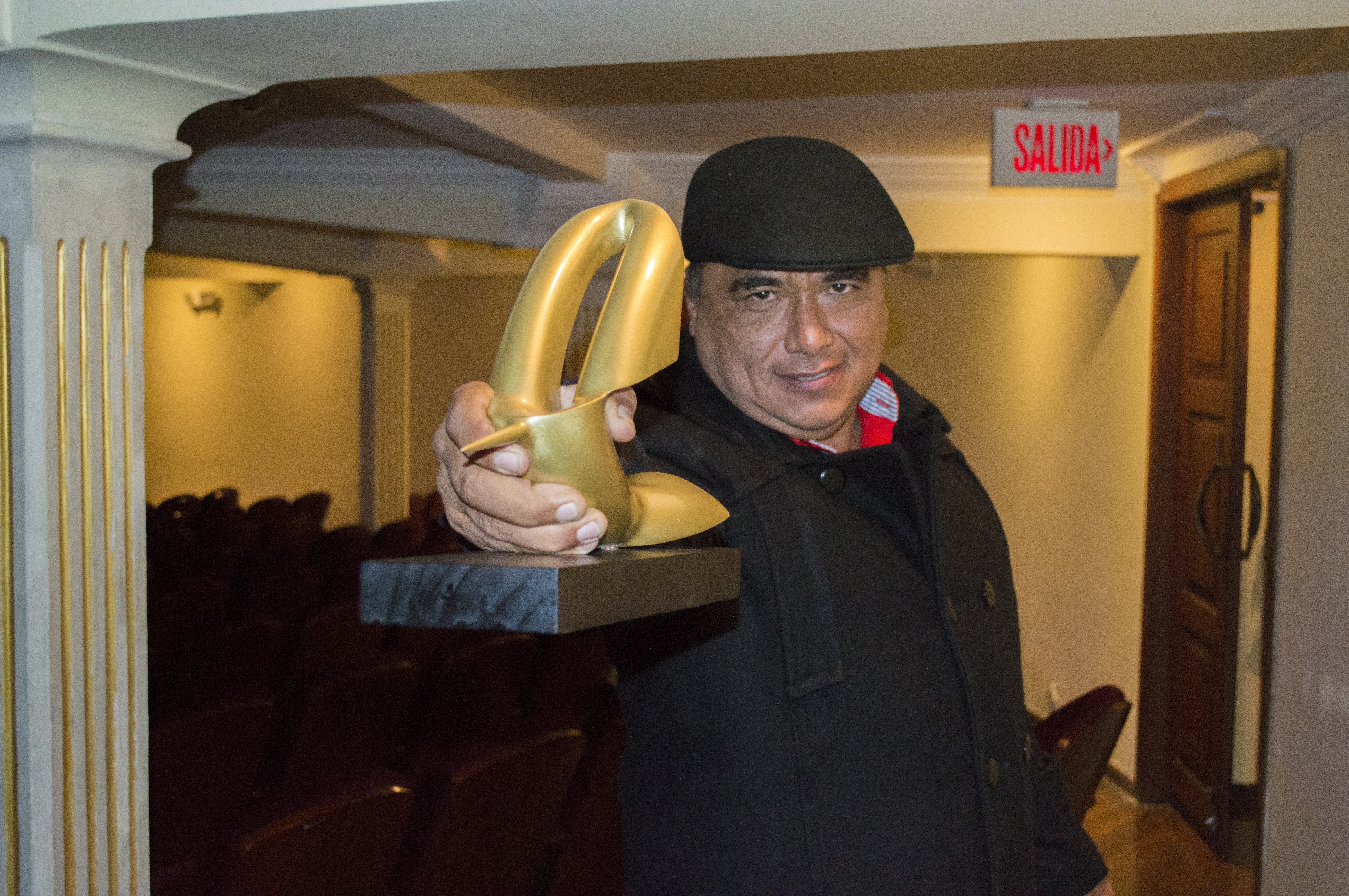 Fernando Cedeño en los Premios Colibrí, con su galardón en la categoría de Mejor Producción para Soporte Físico por su película El Ángel de los Sicarios.